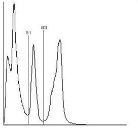 Histogramm der Grauwertverteilung im Bild mit ermittelten Schwellen.